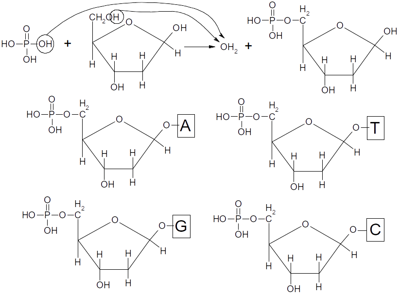 représentations des quatre désoxyribonucléotides